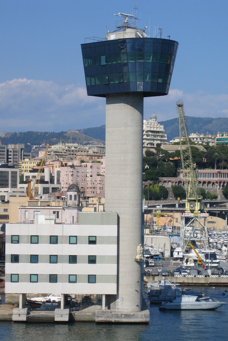 Torre di controllo del porto di Genova (Italia), Giugno 2006